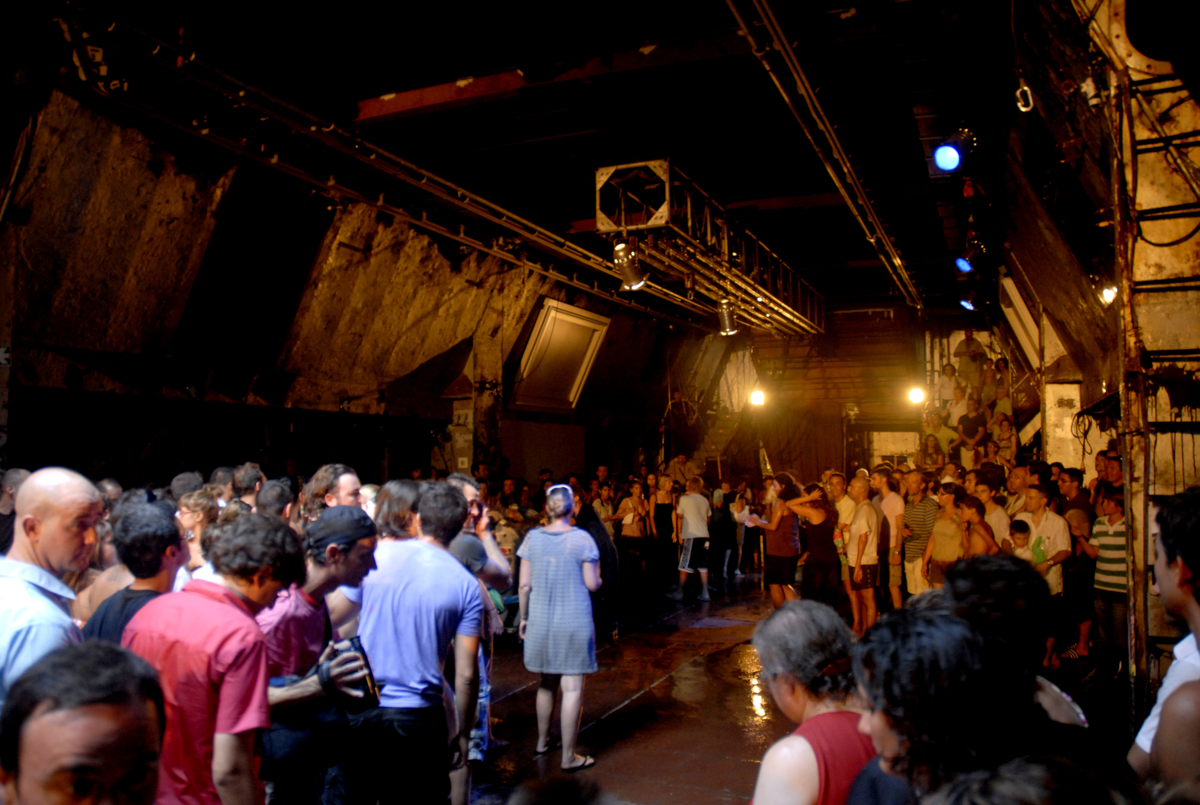 Asiento por favor